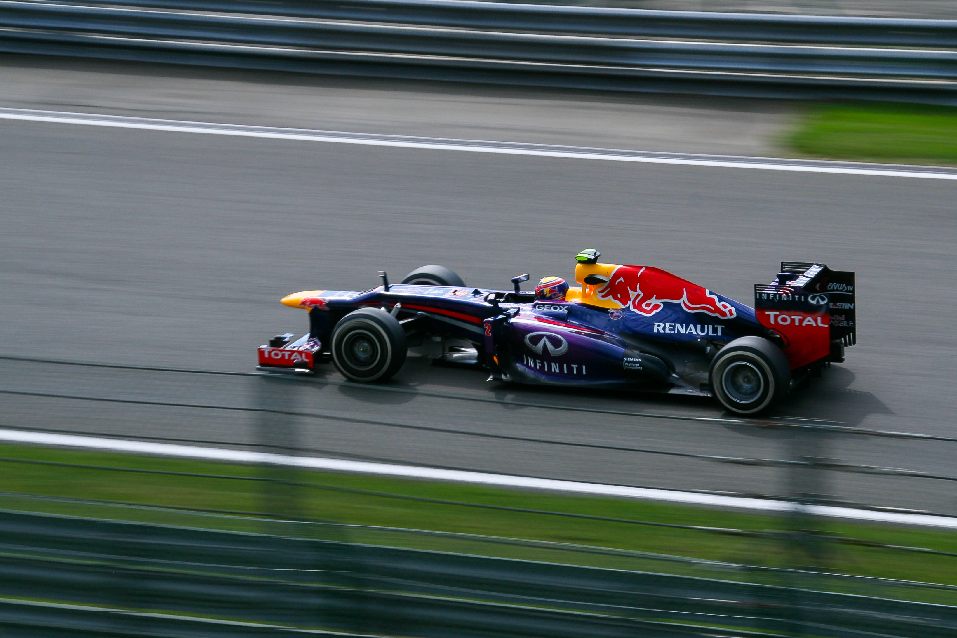 Mark Webber während des zweiten freien Trainings